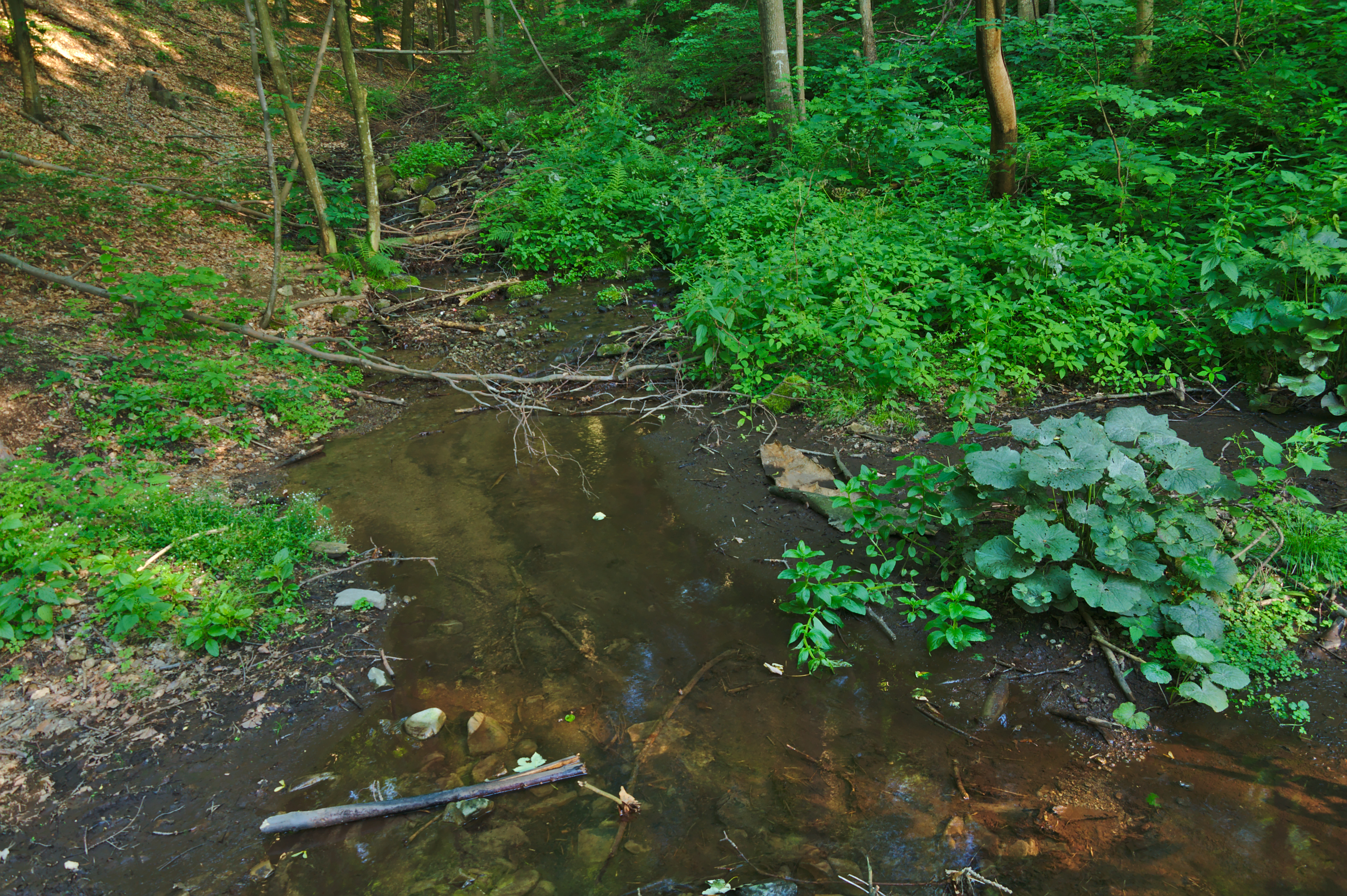 Potok Malá Bystrá, pohorie Vihorlat